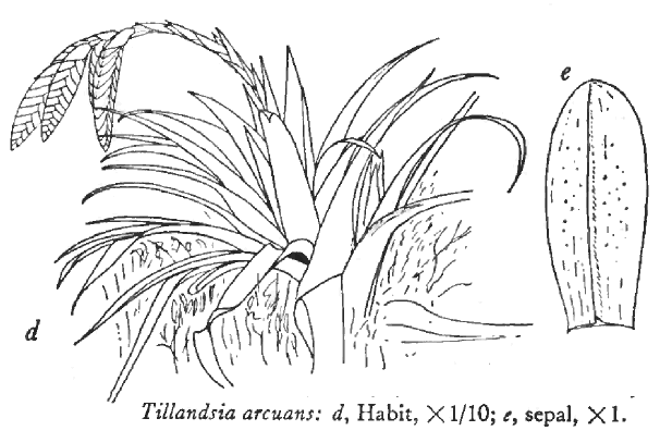 Illustration du protologue de Tillandsia arcuans L.B.Sm. (réorganisée)